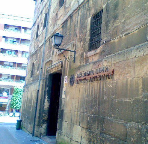 Sé de l'Academia de la Llingua Asturiana nel Conventu Les Pelayes d'Uviéu, na cai L'Águila